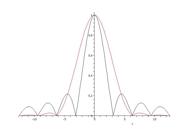 Spektren von Window-Funktionen (Rechteck und Hamming)